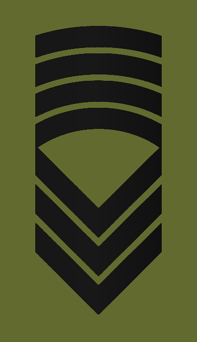 OR9 NOR - Sersjantmajor Hær